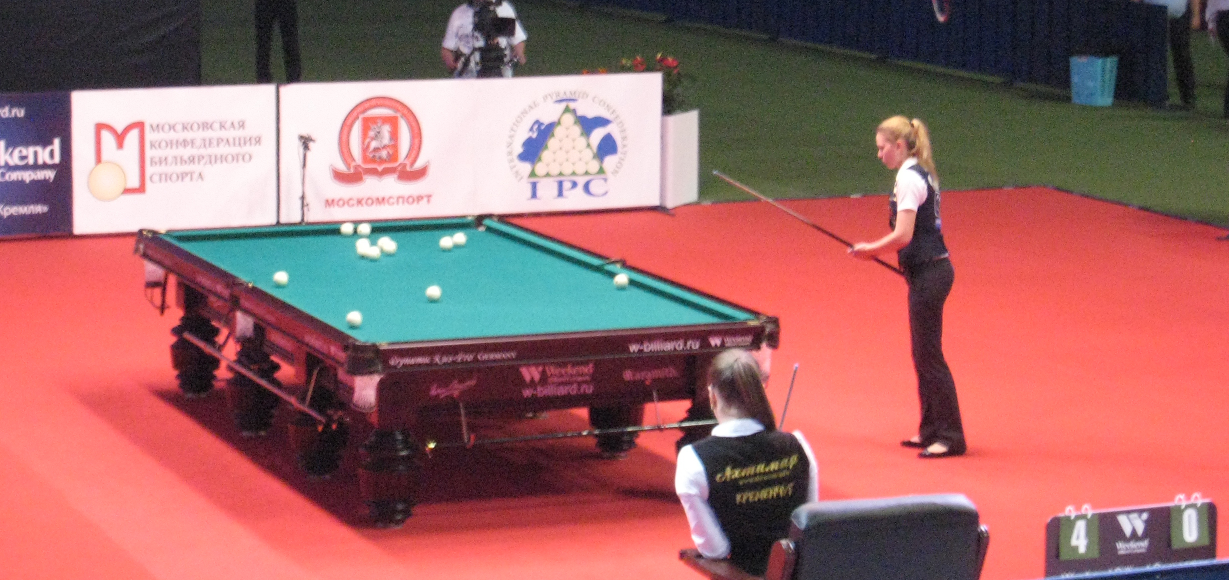 Финальный матч Кубка Мэра 2014 по бильярду в женском турнире между Анастасией Ковальчук и Дианой Мироновой